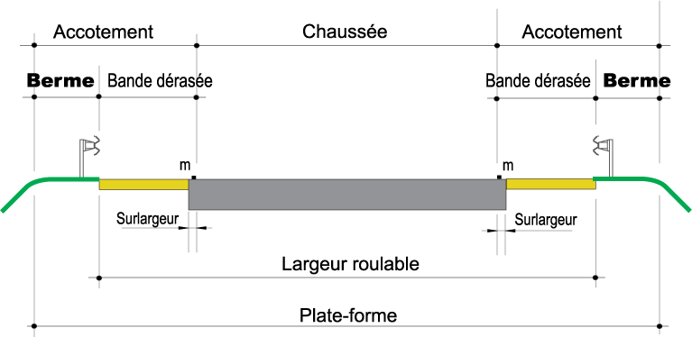 Terminologie routière – Berme